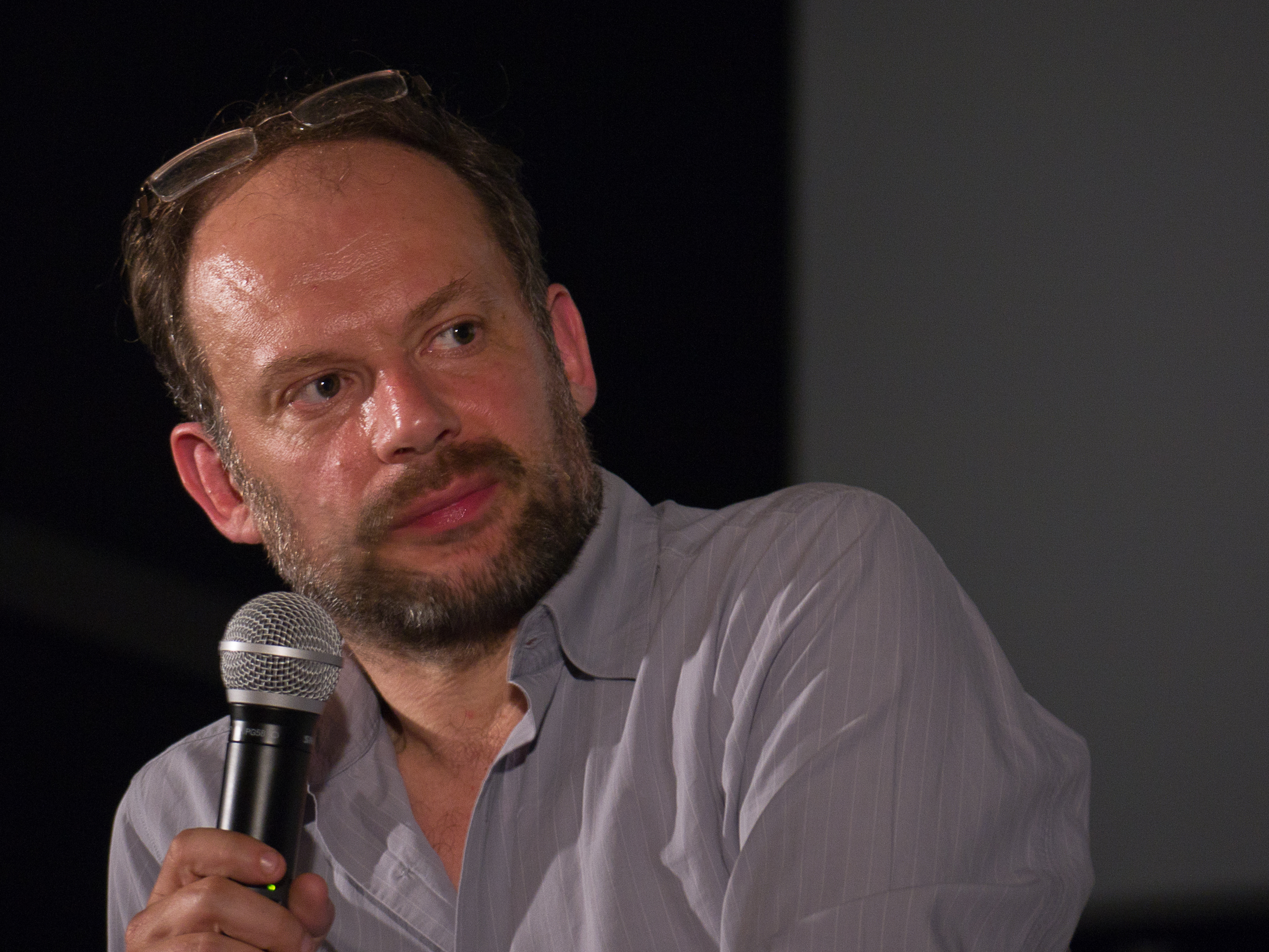 Une leçon de cinéma - François Bégaudeau reçoit Denis Podalydès le lundi 16 septembre 2011 au Gaumont Parnasse à Paris.